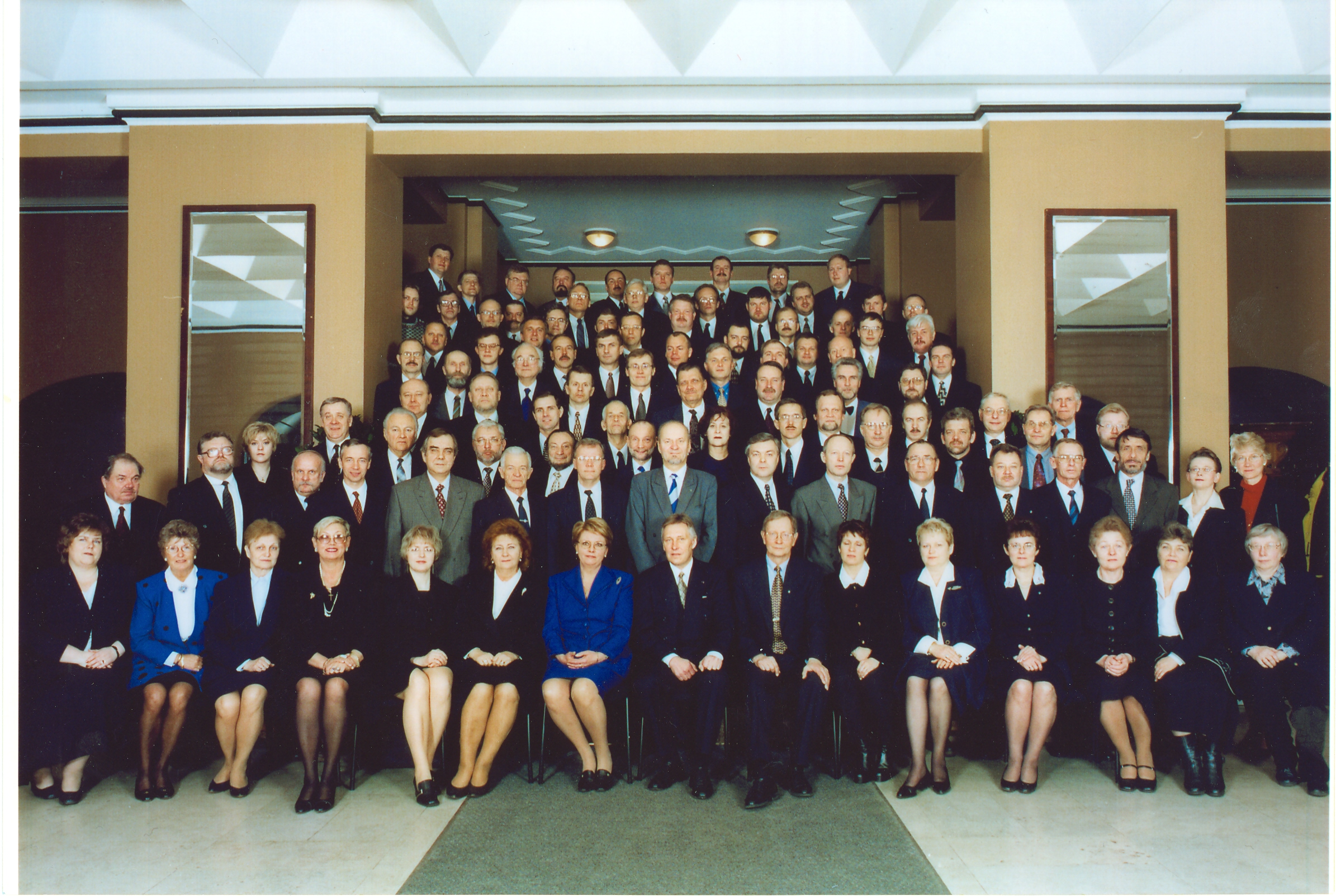 IX Riigikogu koosseisu lõpupilt.